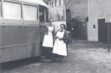 Ambulanzbus.